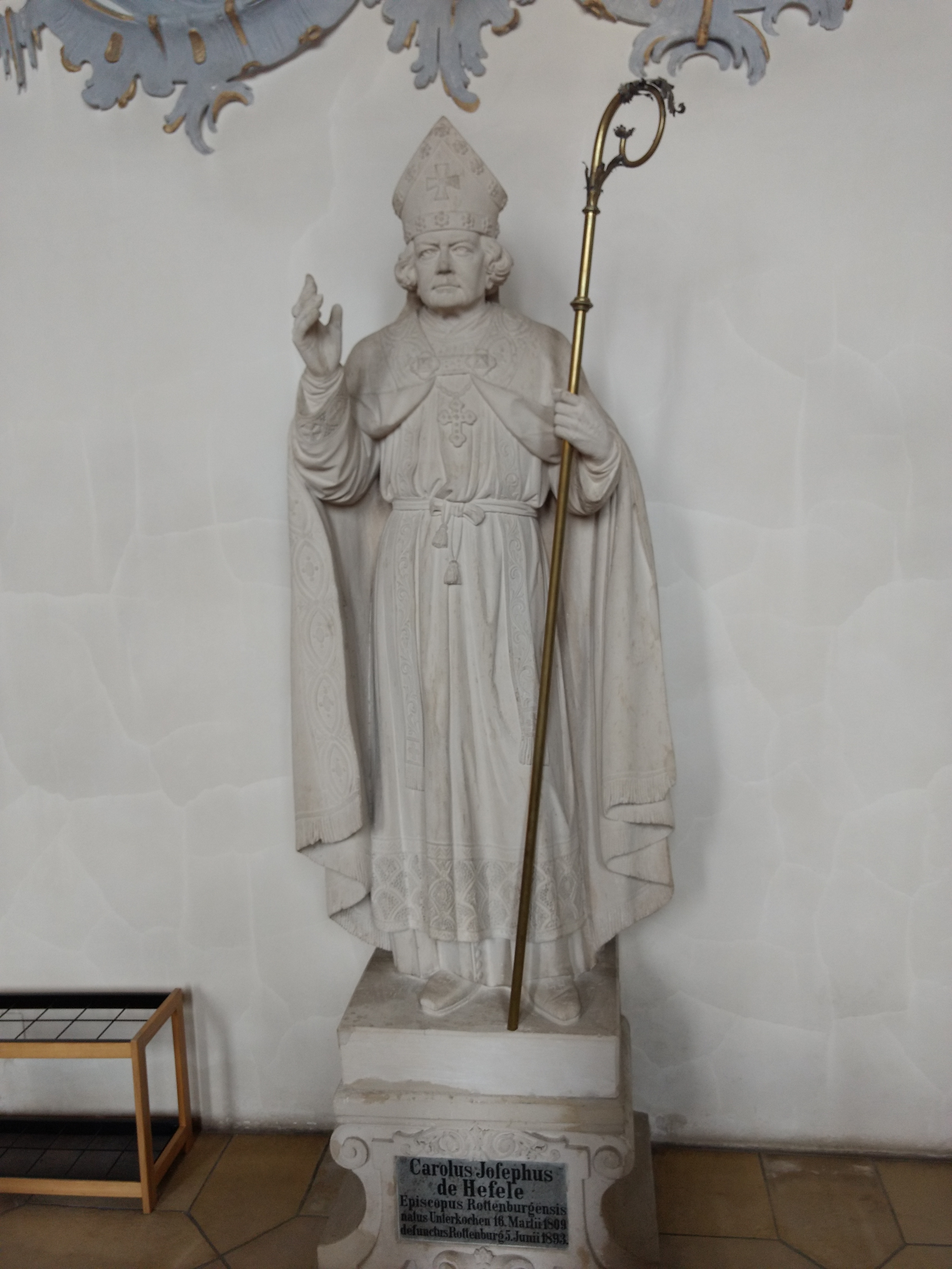 Wallfahrtskirche Unterkochen, Statue Hefele